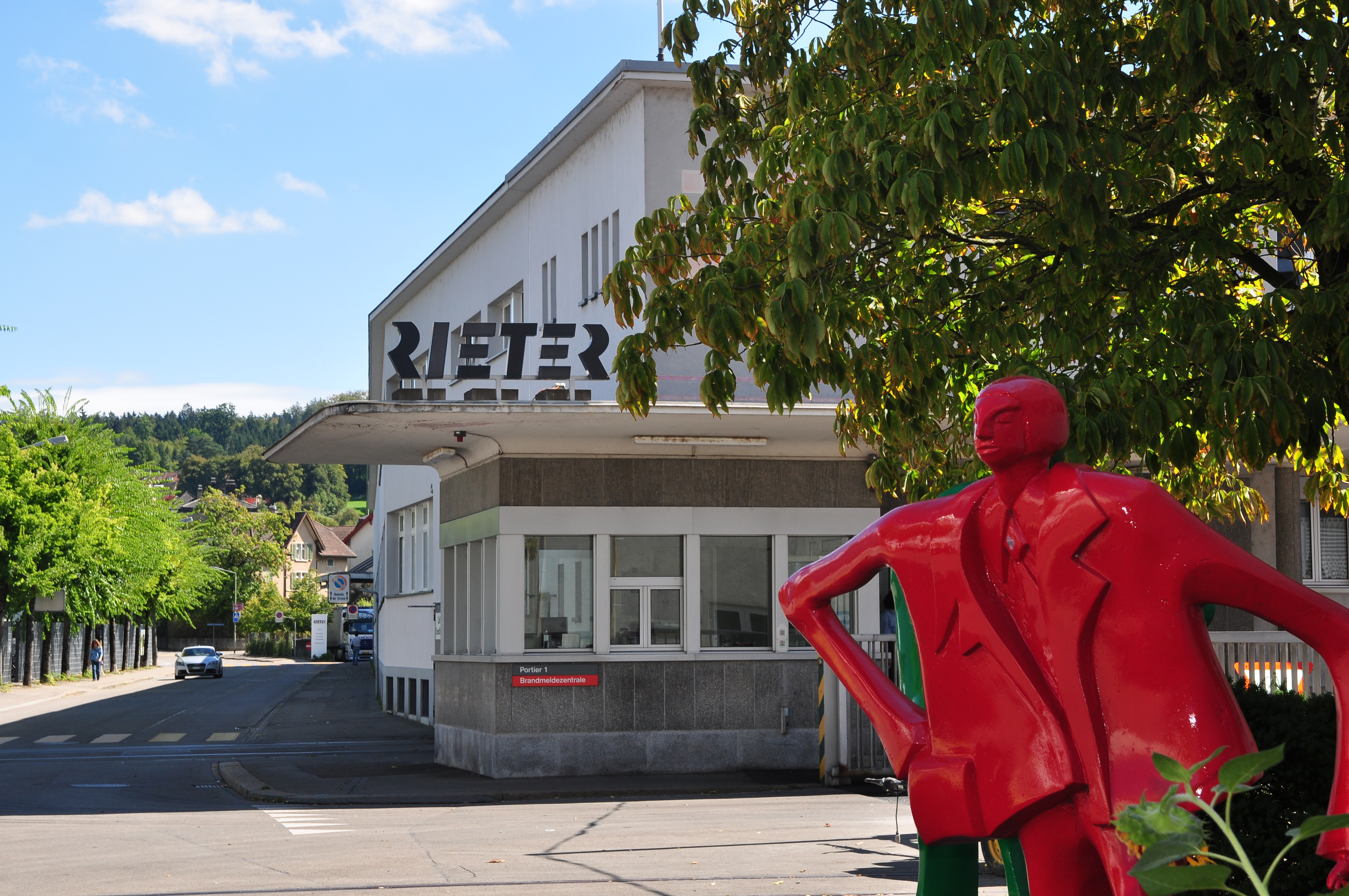 Maschinenfabrik Rieter AG, Historisches Archiv, Klosterstrasse 20 in Winterthur (Switzerland)